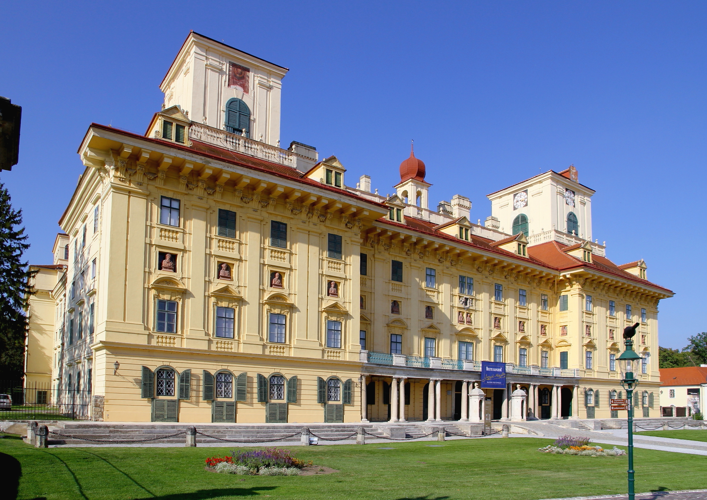 Das Schloss Esterhazy in der burgenländischen Stadt Eisenstadt.